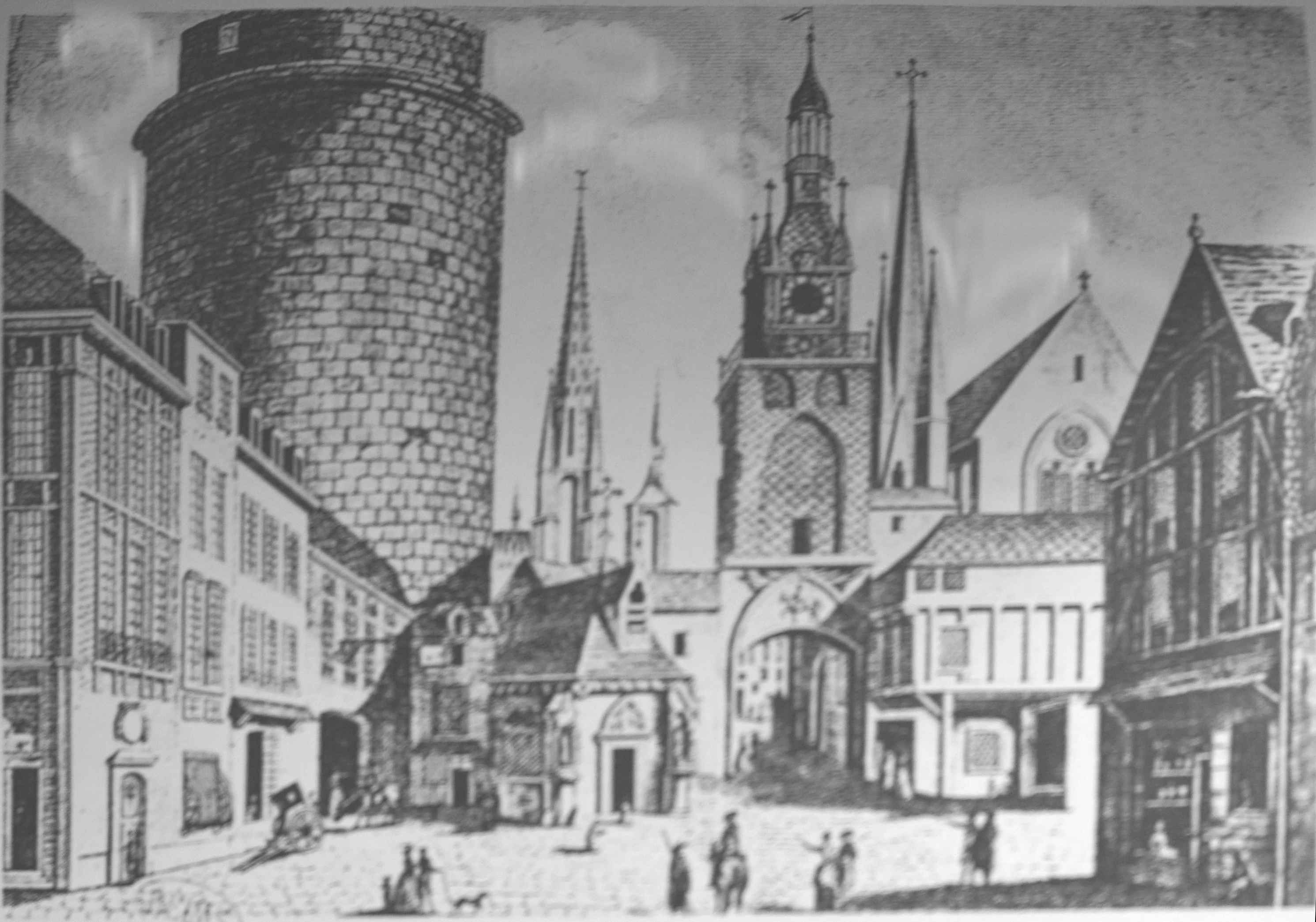 vue de la place du bourg avec la Chapelle de la trinité, l'eglise st-Michel et la tour de Louis d'Outremer ; toutes ces structures ont étées détruites.